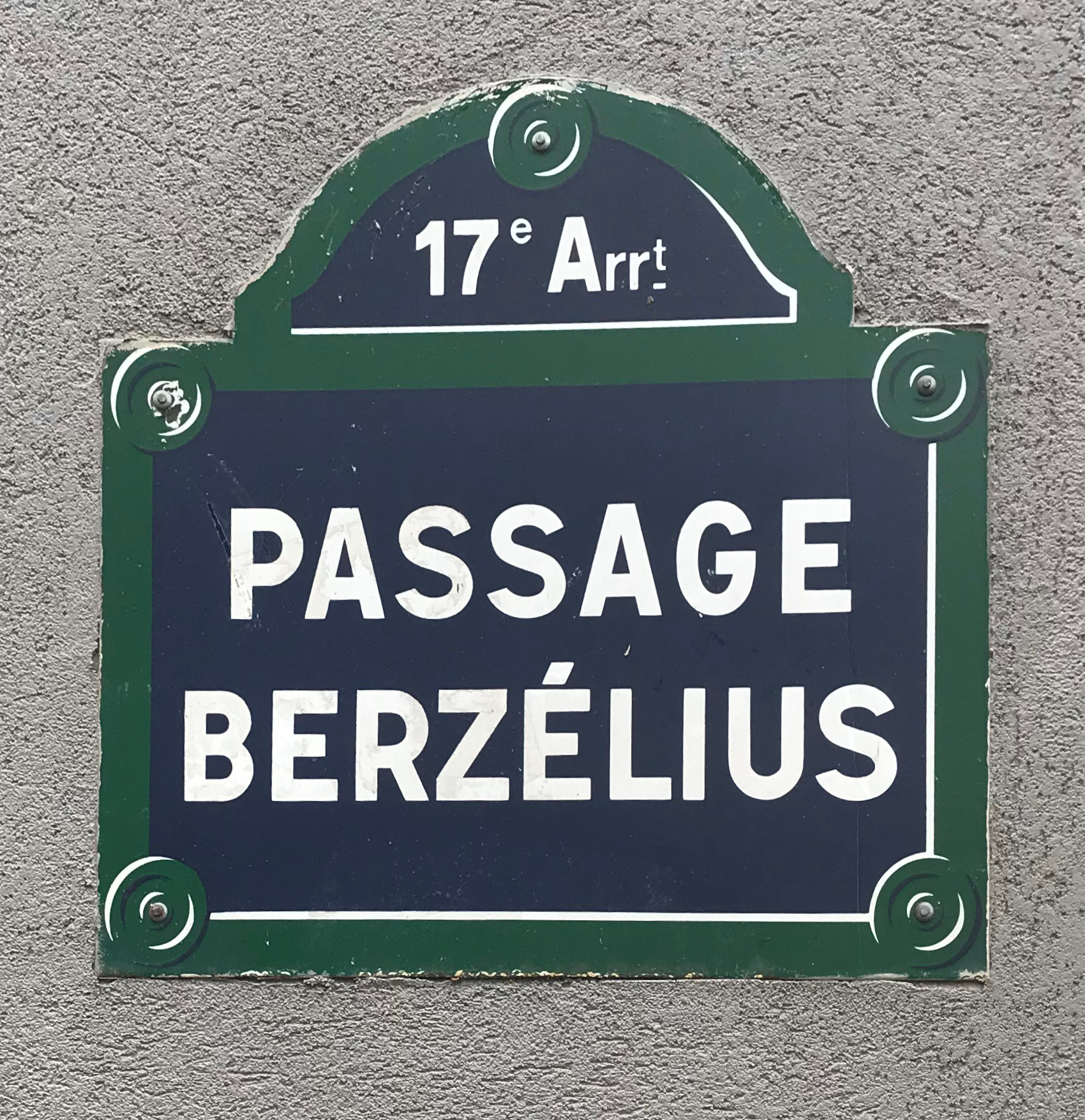 Image de Paris, septembre 2018.